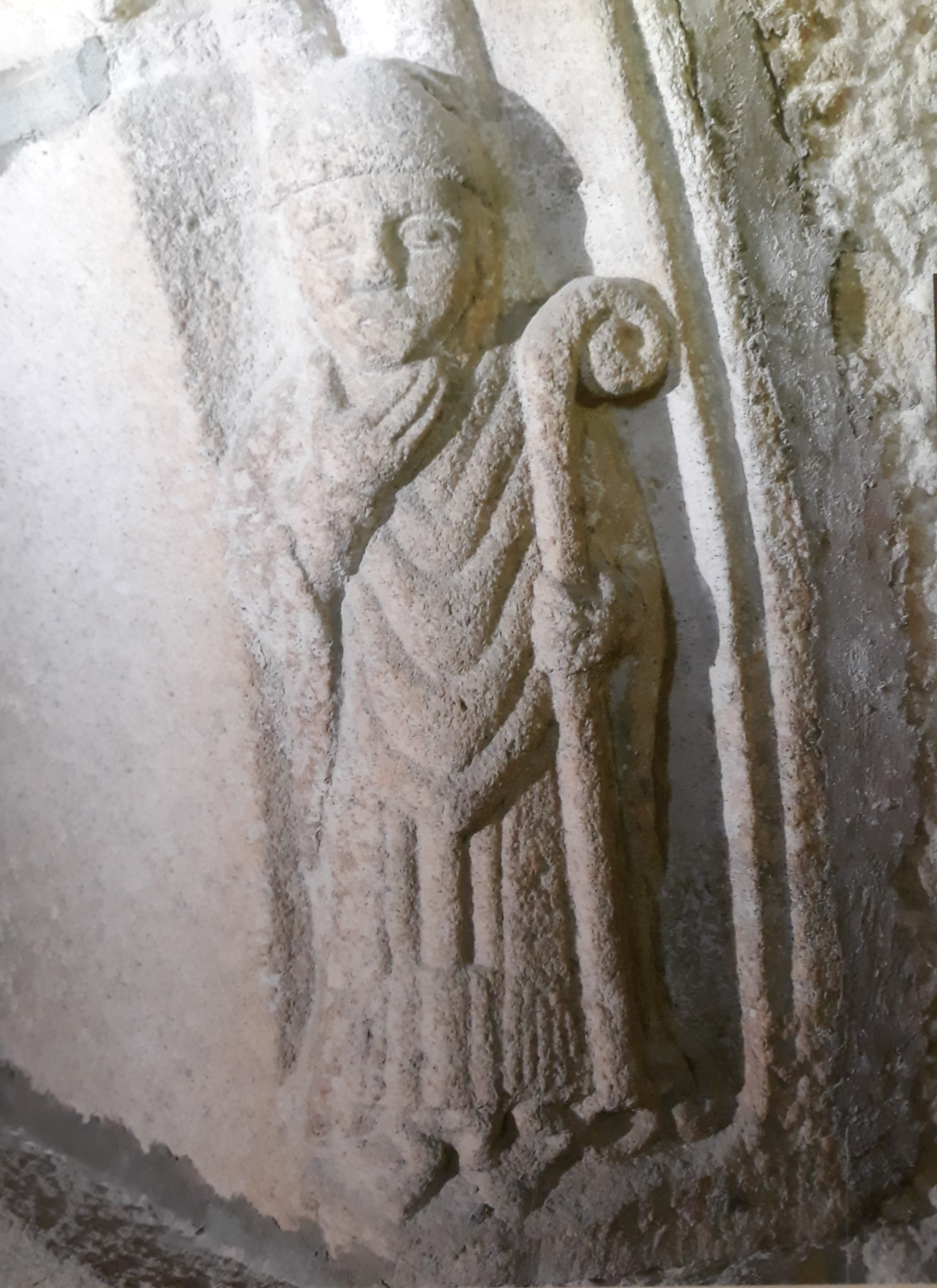 Bispo no arcosolio do sepulcro de Rodrigo Esquio